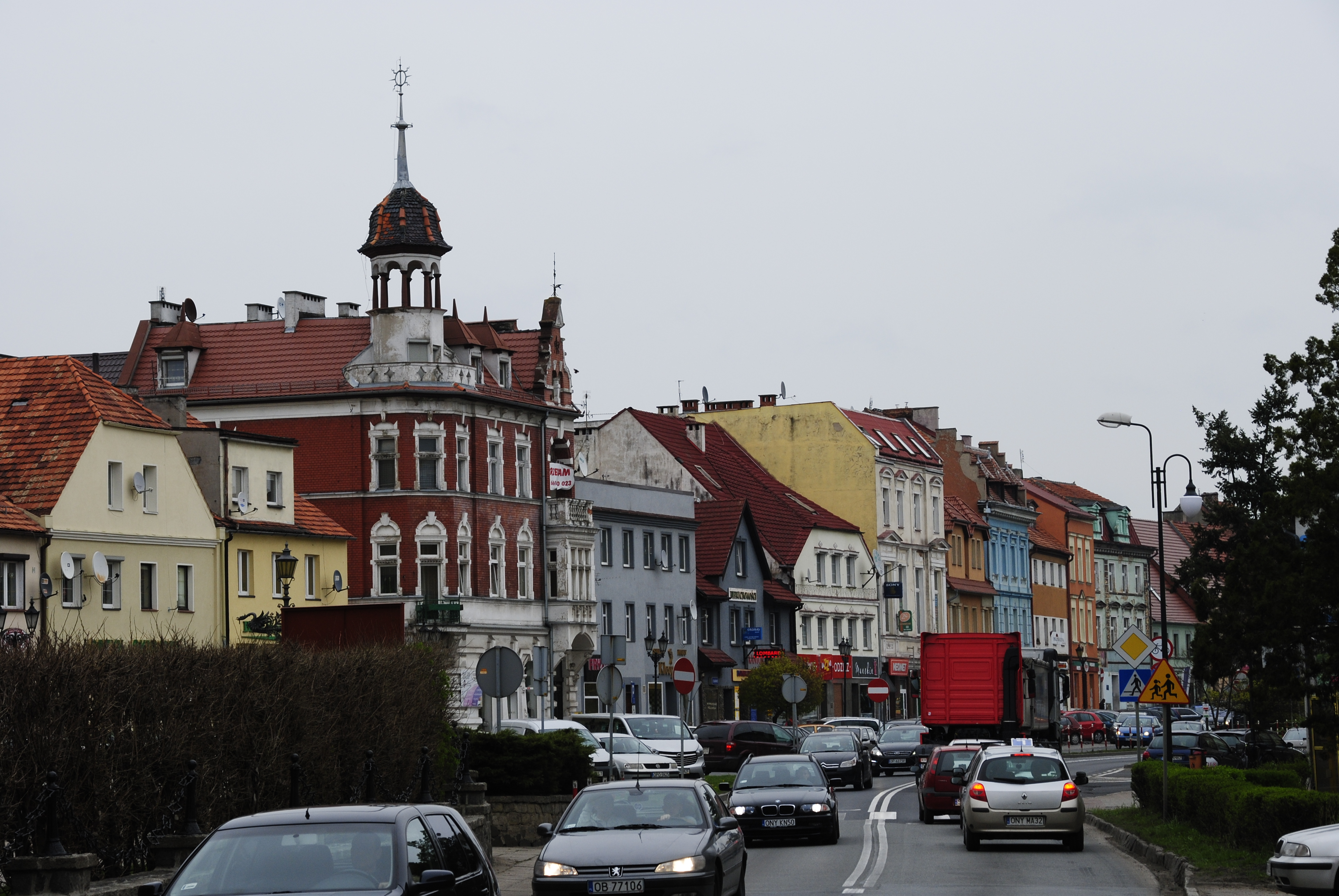 Falkenberg O.S. (poln. Niemodlin) - Ring Nordseite